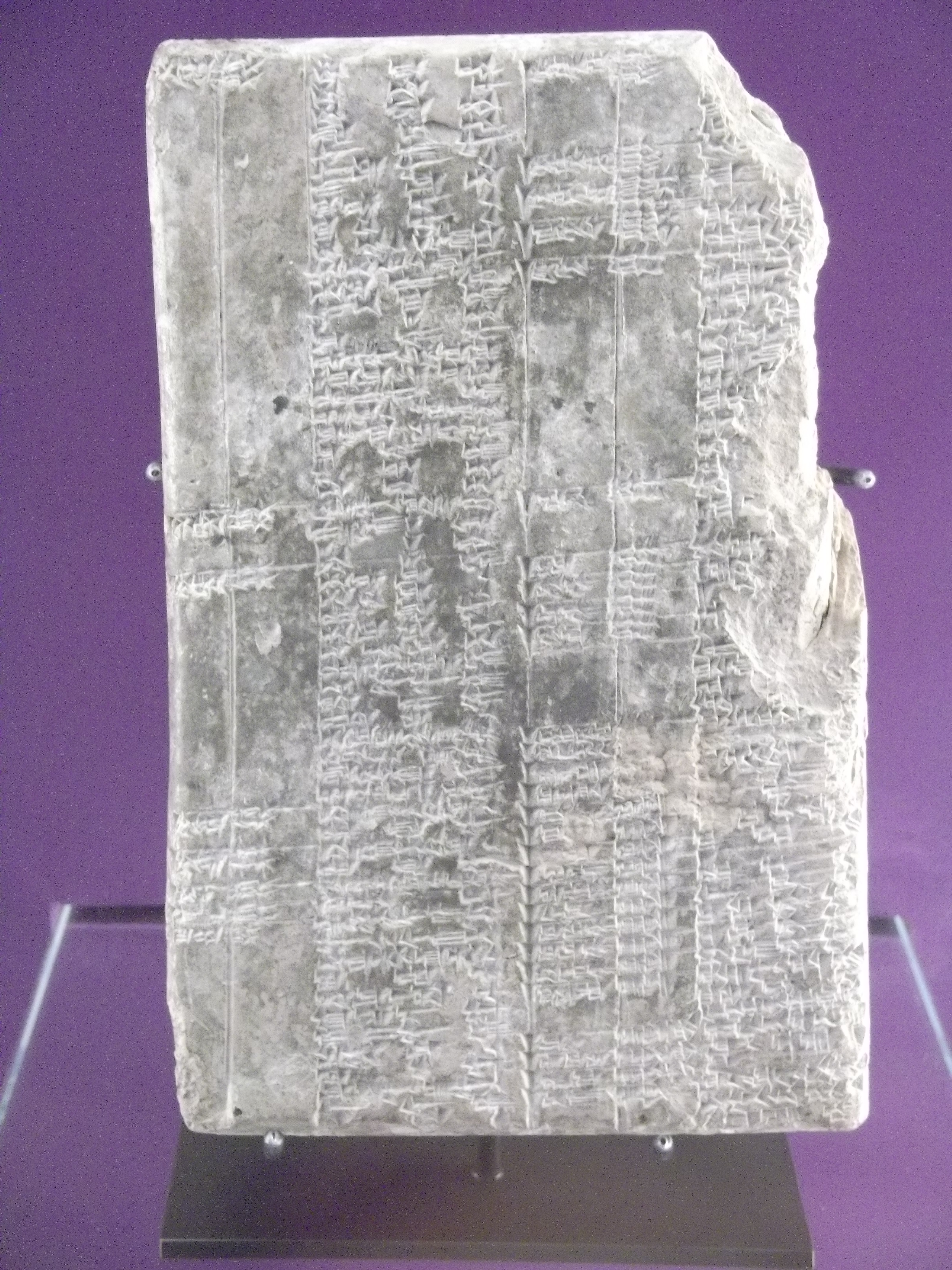 Wörterbuch um 600 v. Chr. aus Uruk mit einer Systematisierung der Zeichen, Louvre AO 7661